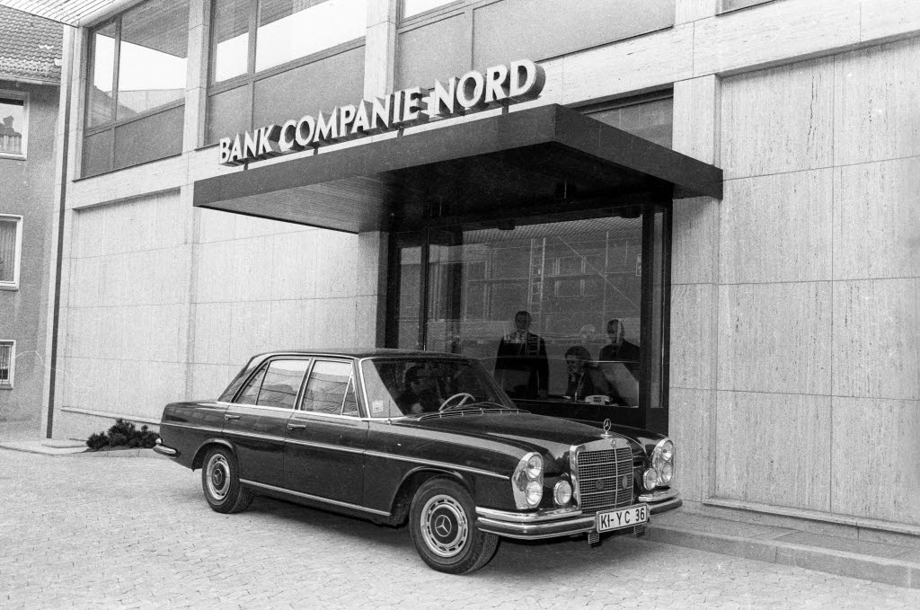 Bankgeschäfte können vom Fahrersitz aus erledigt werden.